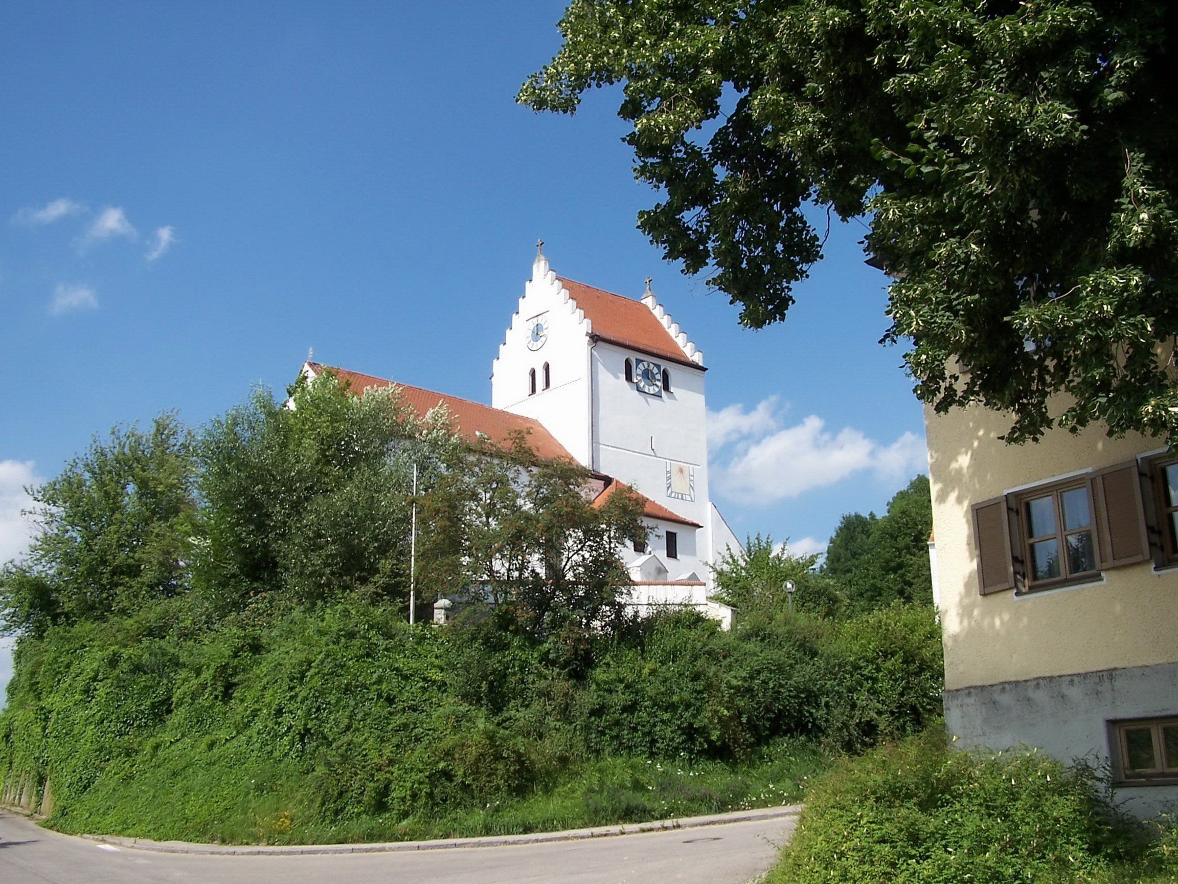 Obertunding, Otteringer Straße 1. Kath. Pfarrkirche St. Katharina, Chorturmanlage mit Sattelturm,Eingangsvorhalle, Südsakristei und östlicher Seelenkapelle am Chor, 12./13. Jh., Langhaus im Kern gotisch, barockisiert; mit Ausstattung; mit Kirchhofmauer